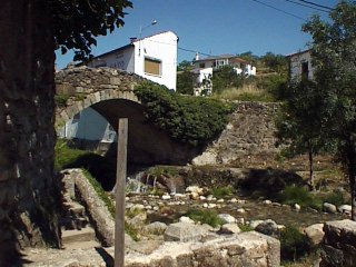 Hervas